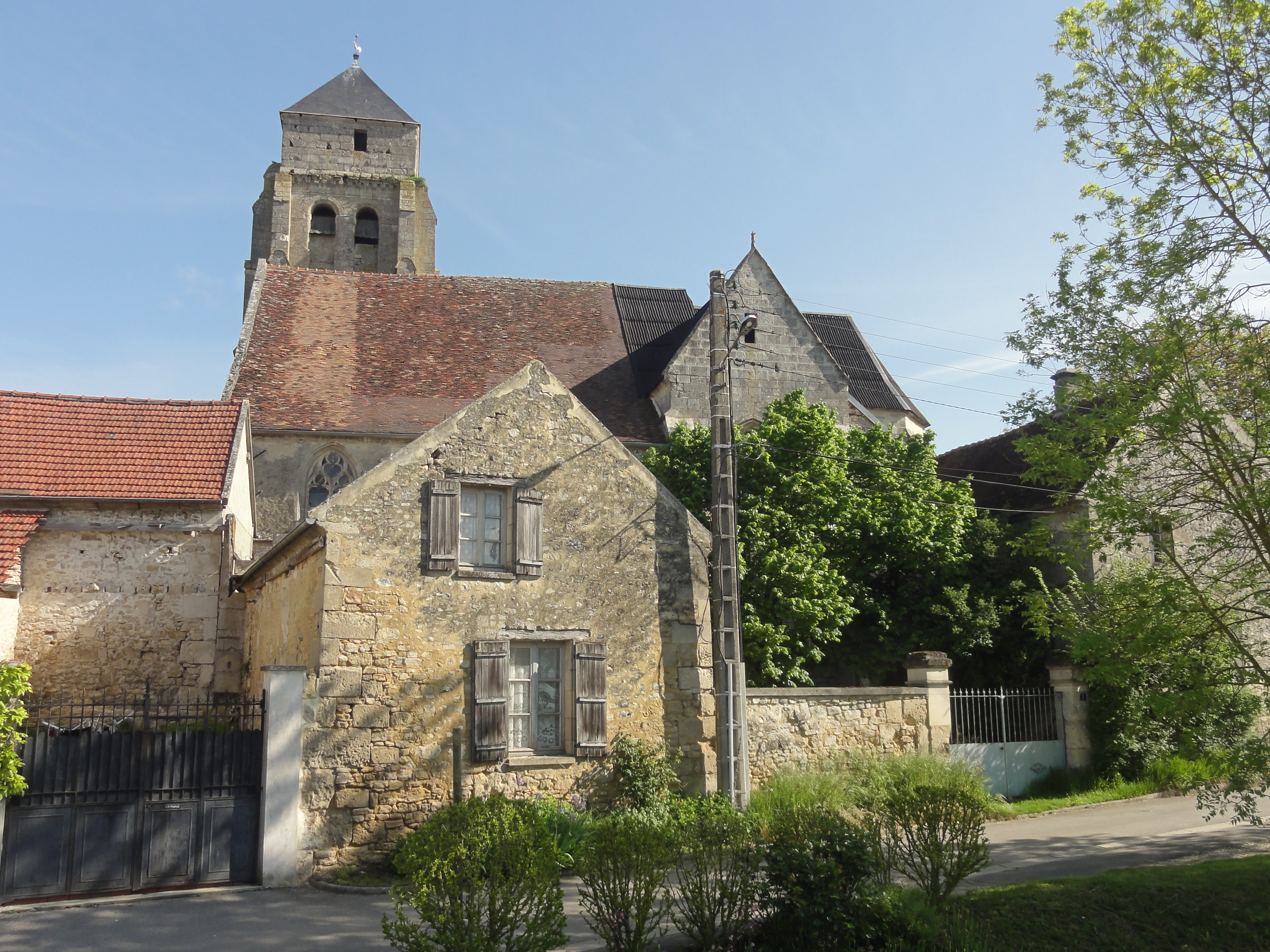 Église Saint-Martin de Feigneux - voir titre.